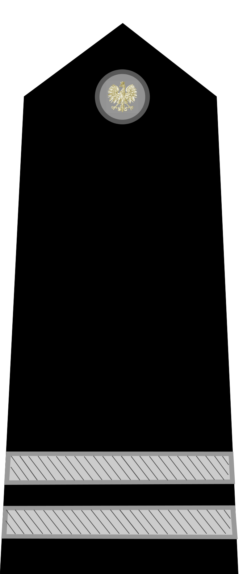 Naramiennik kaprala 1 Dywizji Pancernej PSZ (gen. Maczka)